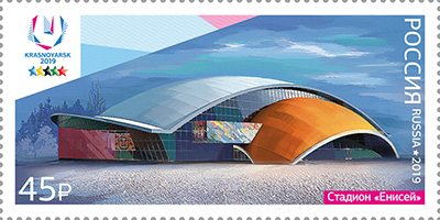 Почтовая марка России, выпущенная 1 февраля 2019 года, из серии «XXIX Всемирная зимняя универсиада 2019 года в г. Красноярске. Спортивные объекты». На марке изображён стадион «Енисей». Дизайнер — Е. Плотникова. Номер по каталогу — 2440.